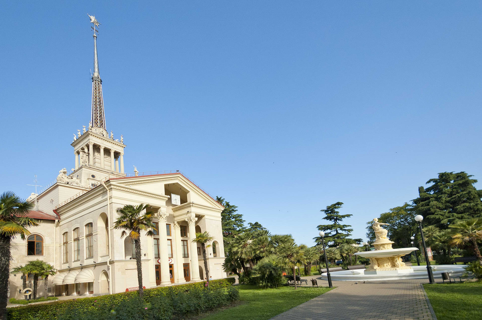 Здание морвокзала (Краснодарский край, Сочи, войкова улица, 1)